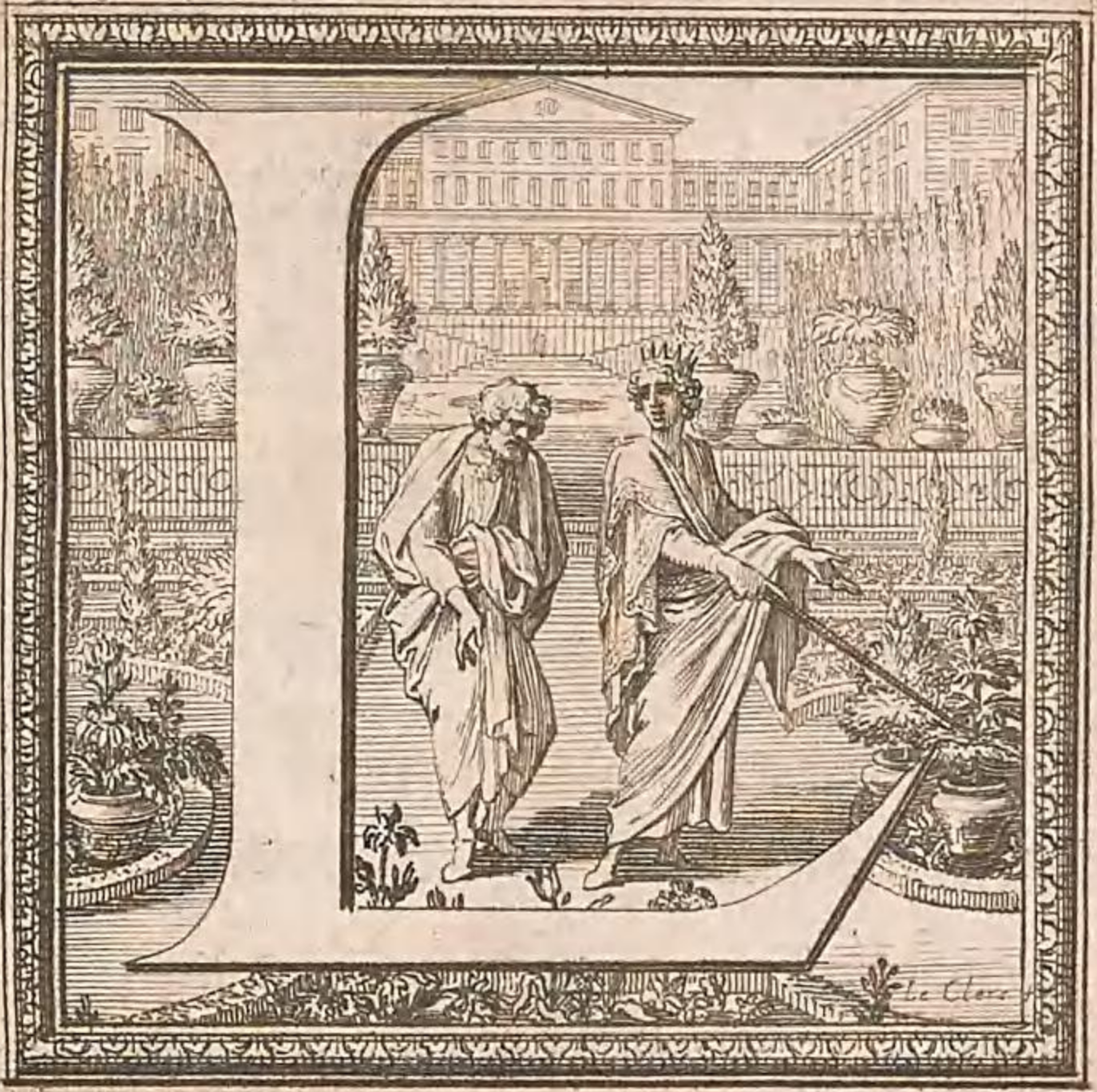 Lettrine L de la première page